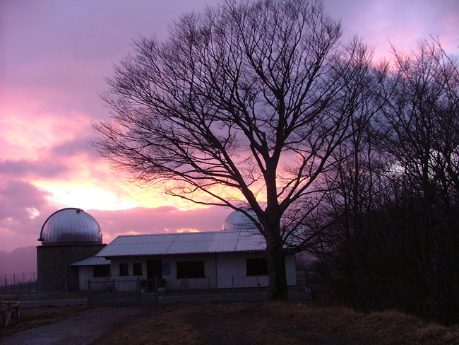 Osservatorio astronomico di Pian dei Termini. La foto è fatta in inverno da una strada soprastante l'osservatorio